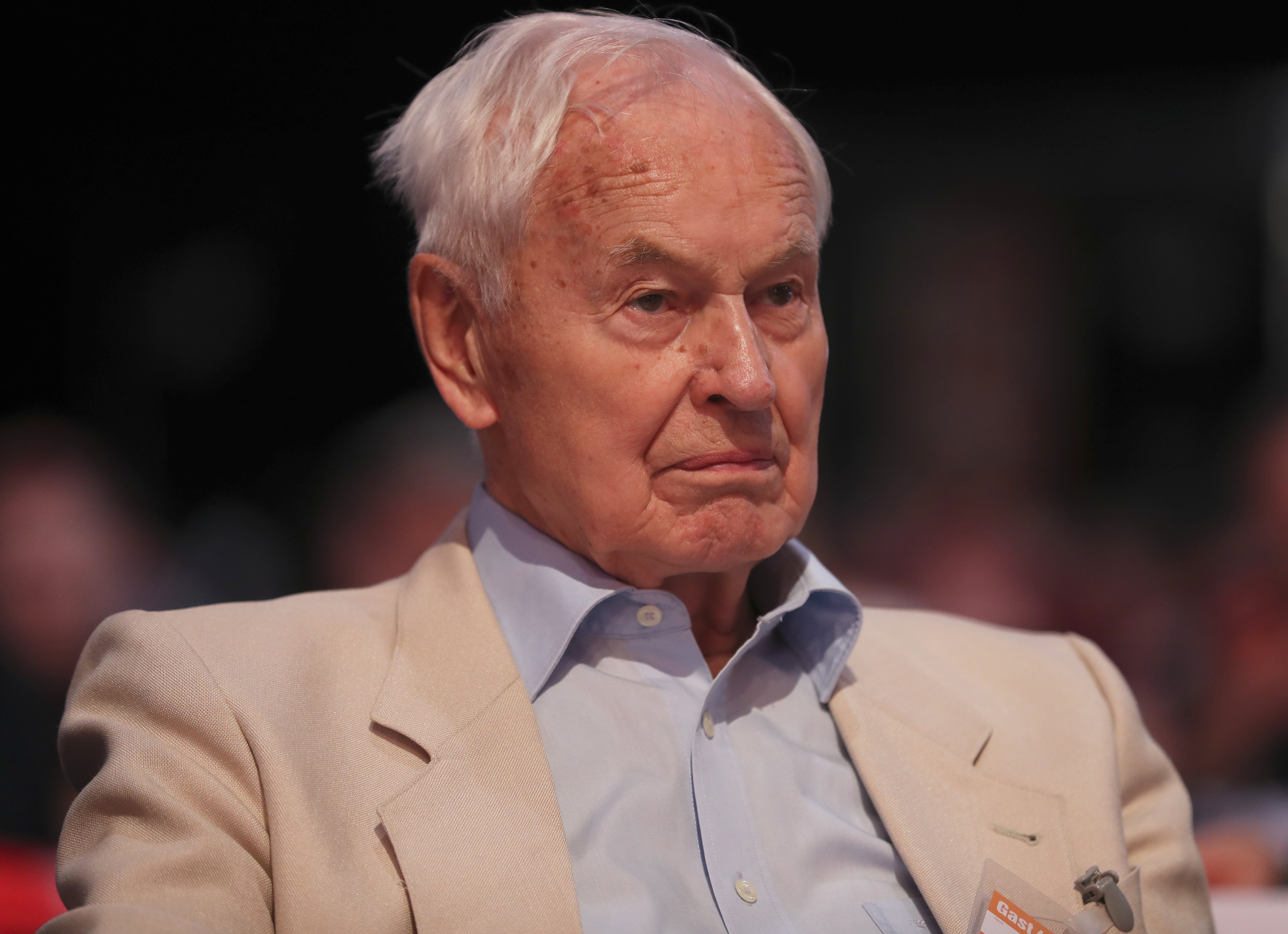 Bundesparteitag Die Linke 2018 in Leipzig